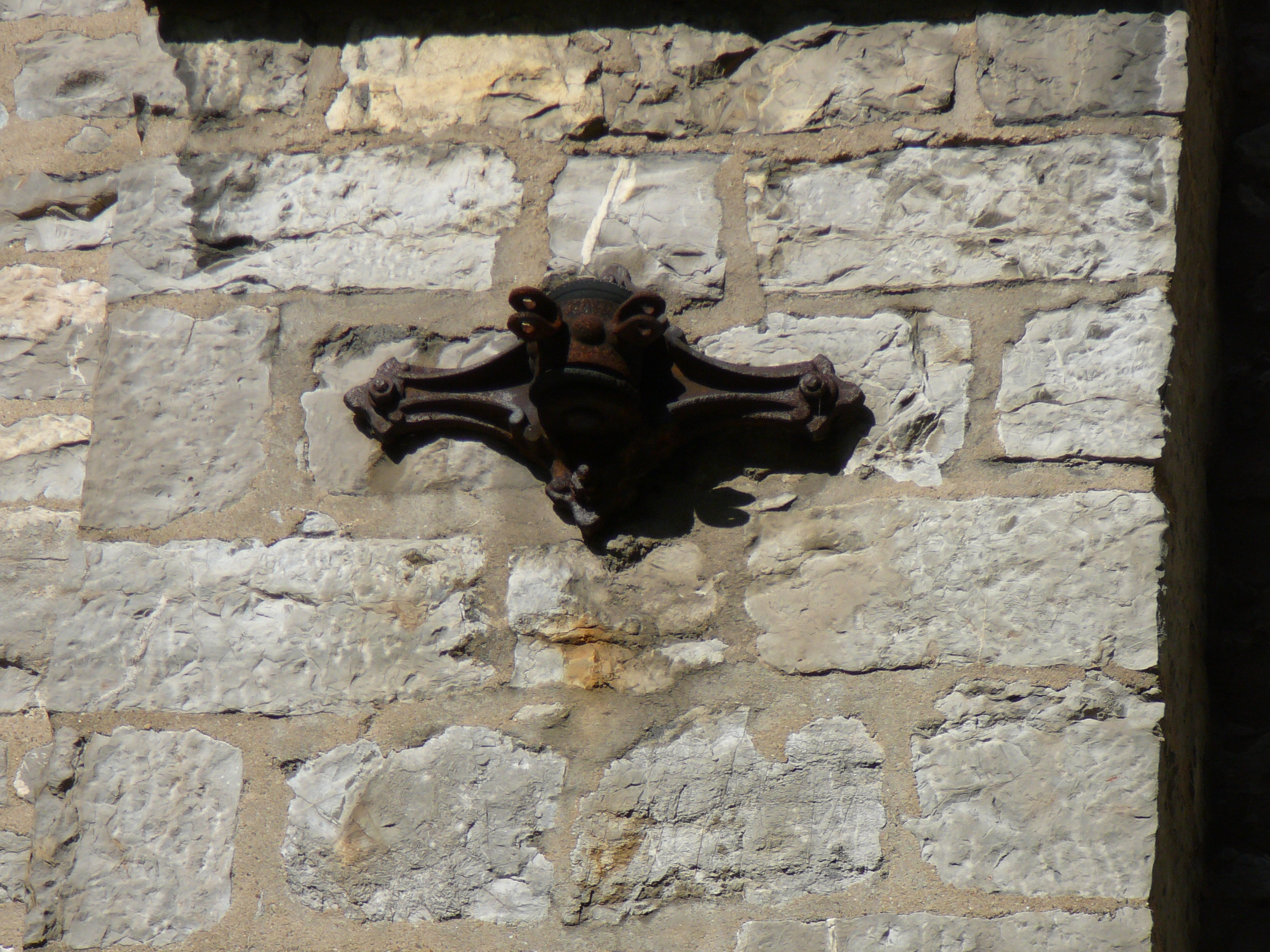 Denkmalbereich 3 (Gruiten-Dorf)This is a photograph of an architectural monument., no. 0